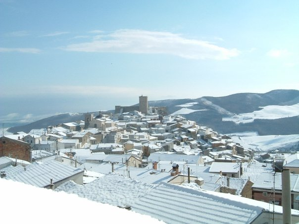 Vista dall'alto dopo nevicata